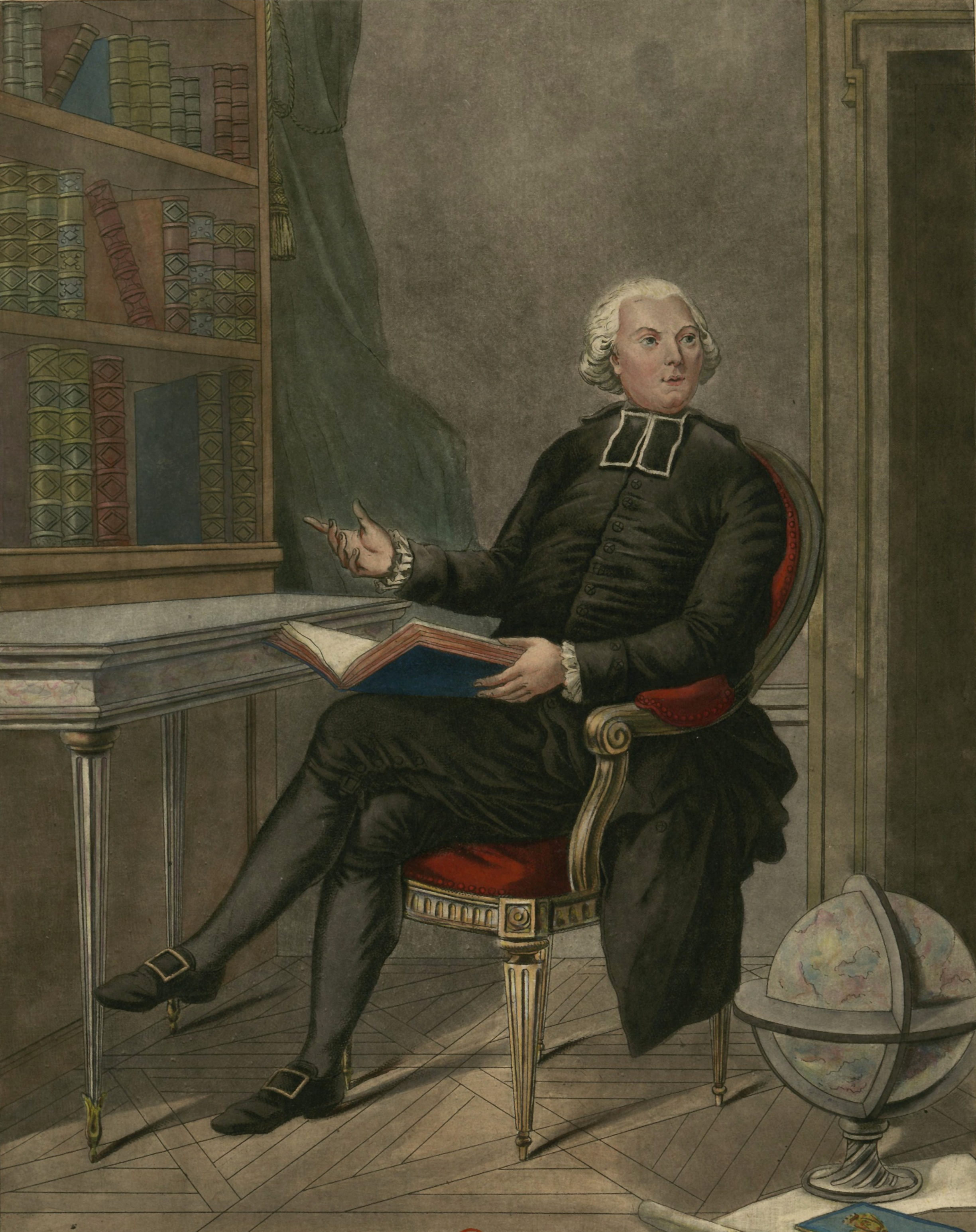 Jean-Sifrein Maury (1746-1817), prédicateur du roi de France, l'un des 40 de l'Academie, né à Vanrens dans le Comtat — Valréas (Comtat Venaissin) — le 26 juin 1746 député par le baillage de Peronne le 1er avril 1789. Estampe. Auteur non identifié. Probablement éditée à Amsterdam, sans non d'éditeur.